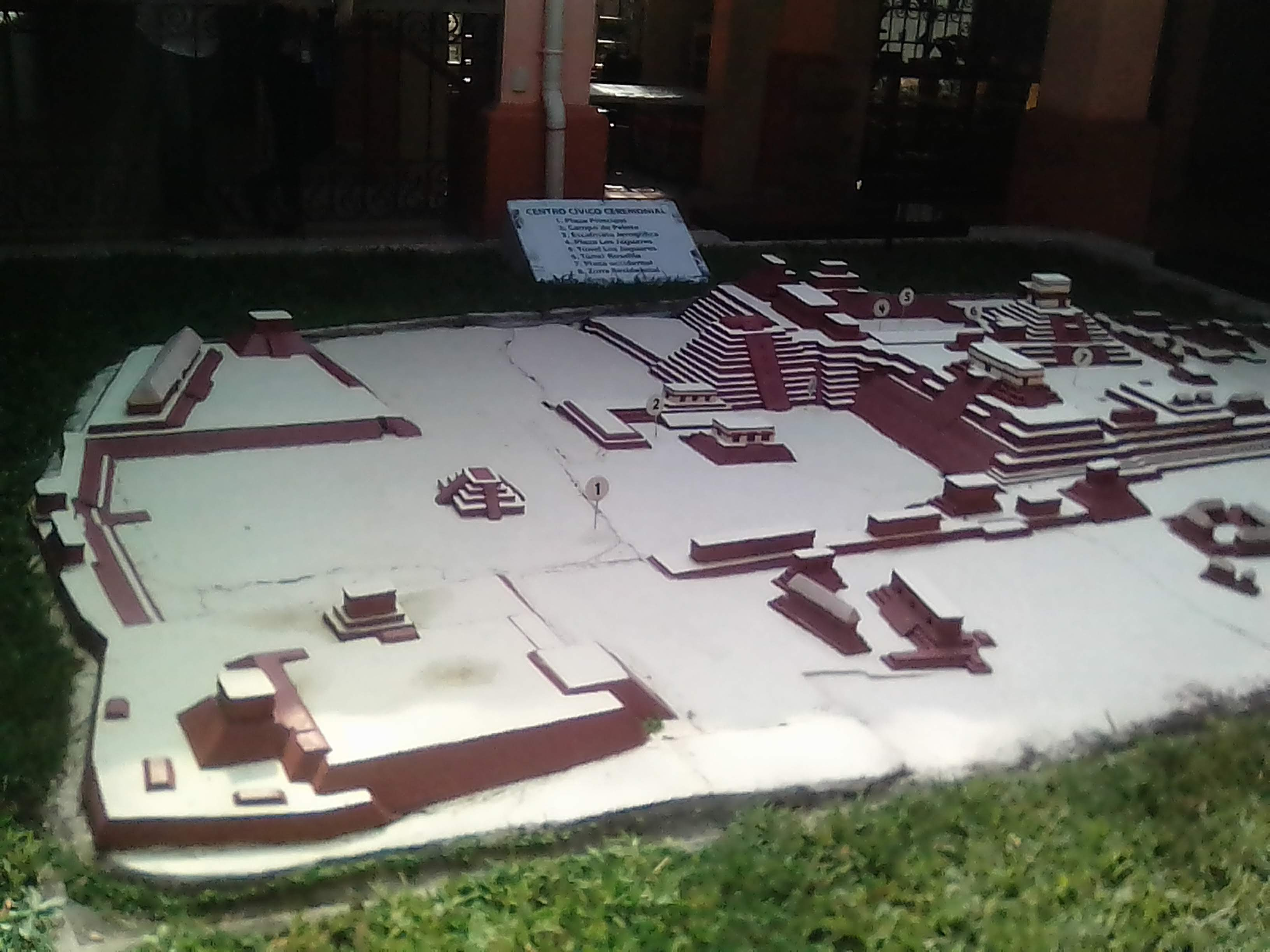 Maqueta que muestra el centro cívico y ceremonial de Copan